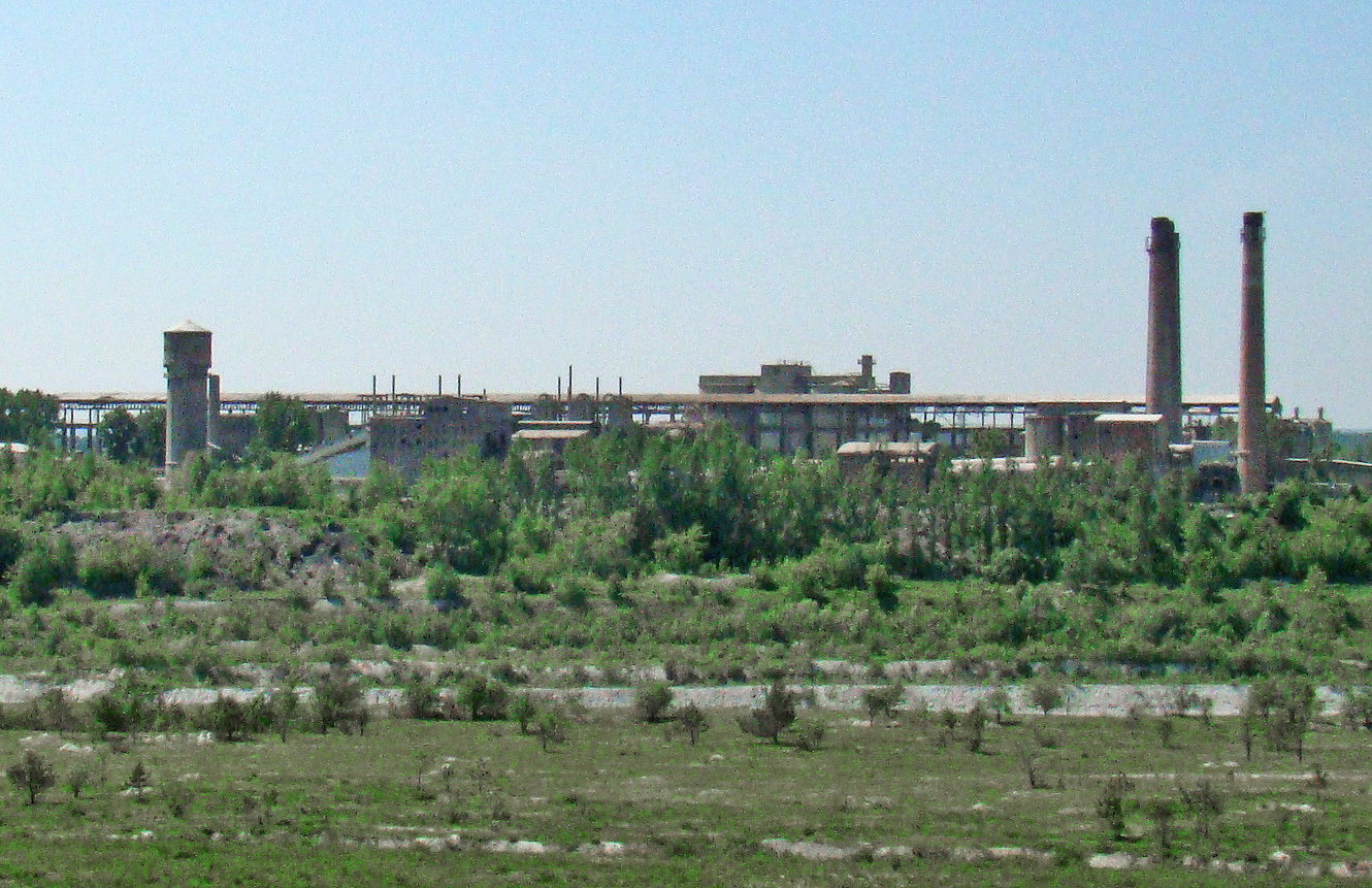 Cementownia w Rejowcu Fabrycznym